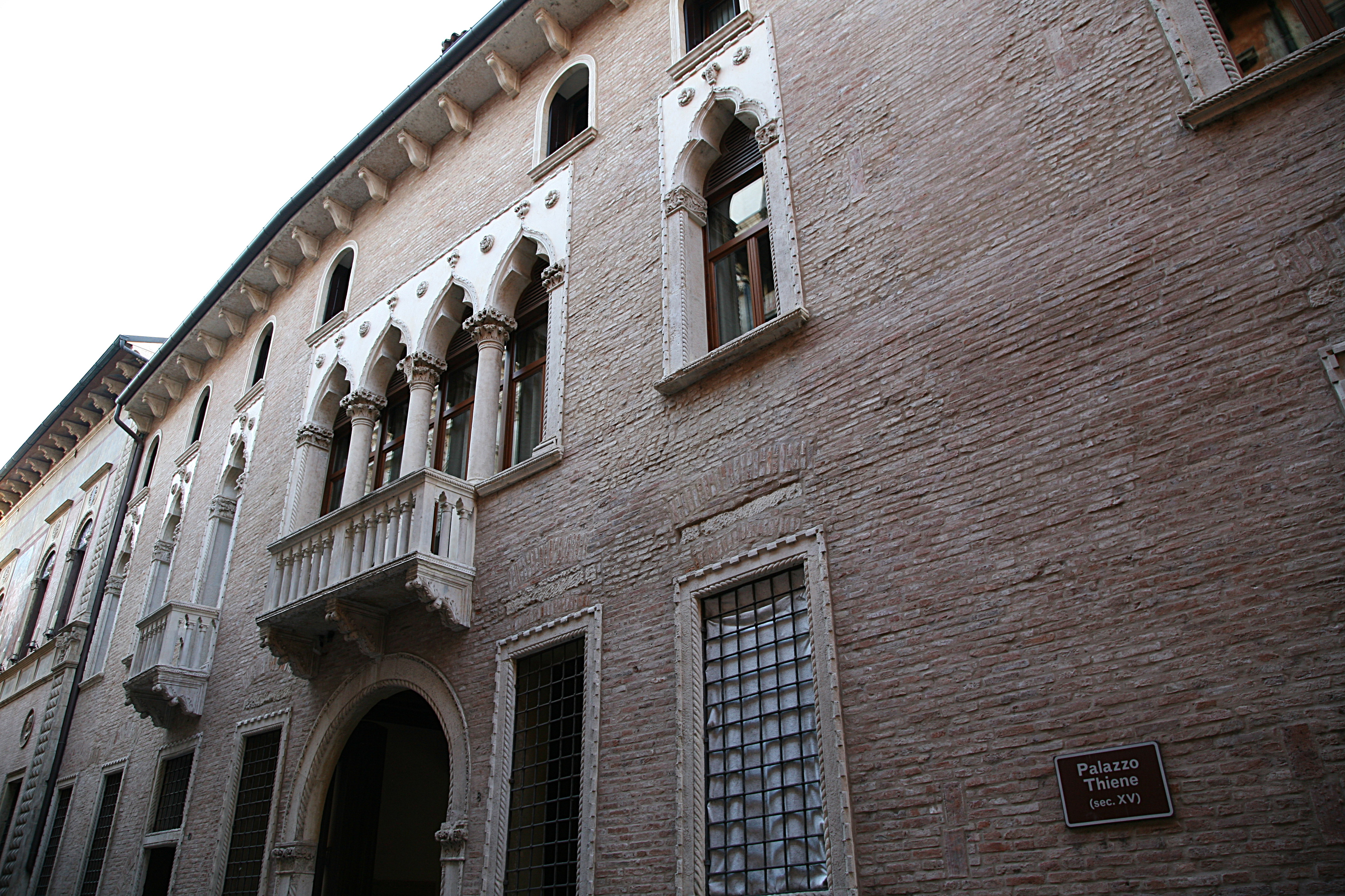 Palazzo Thiene, Vicenza, gothic palace, Contra Porti 8, 15th-century.